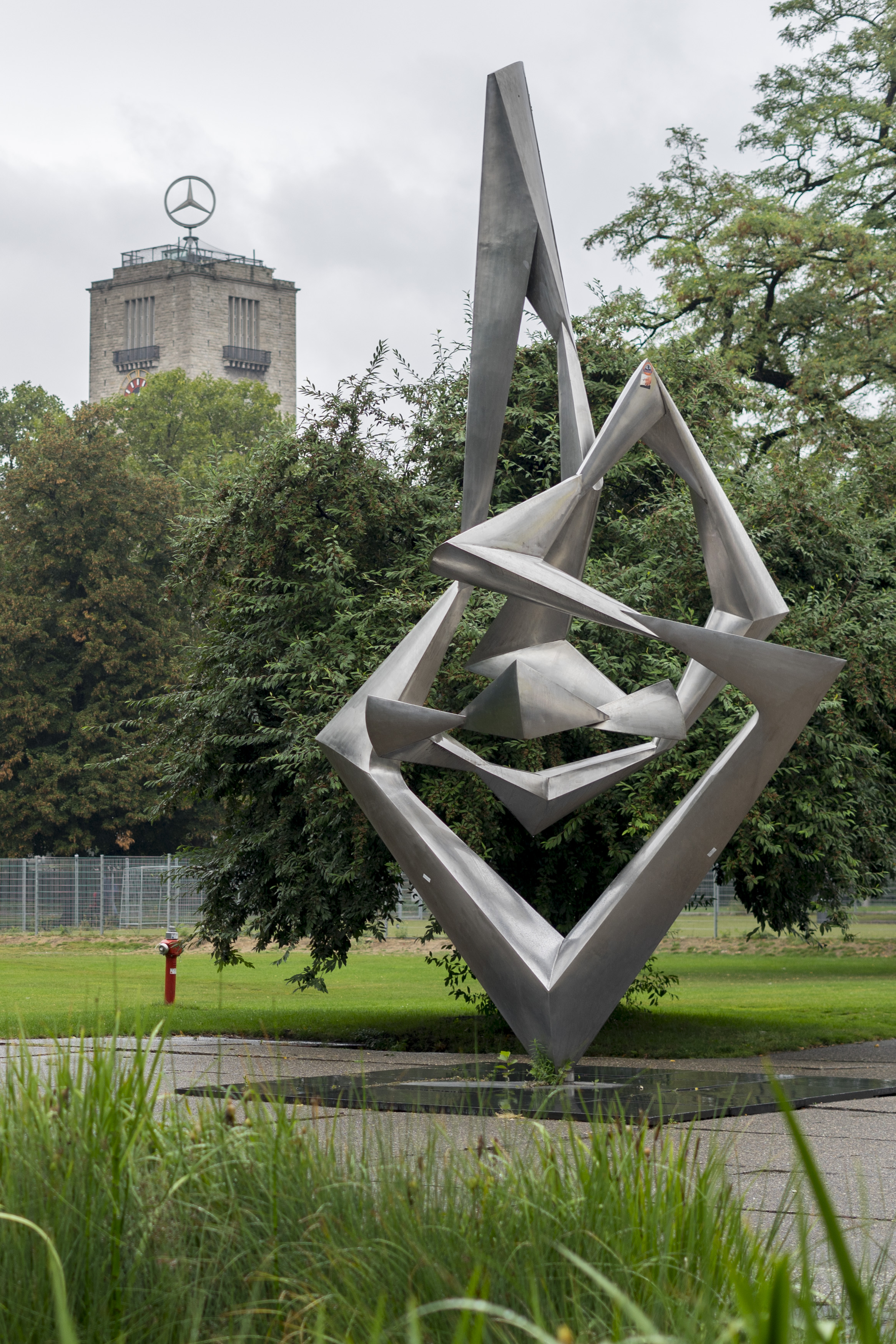 Skulptur Wander Bertoni, Stuttgart. Im Hintergrund der Turm des Bahnhofs